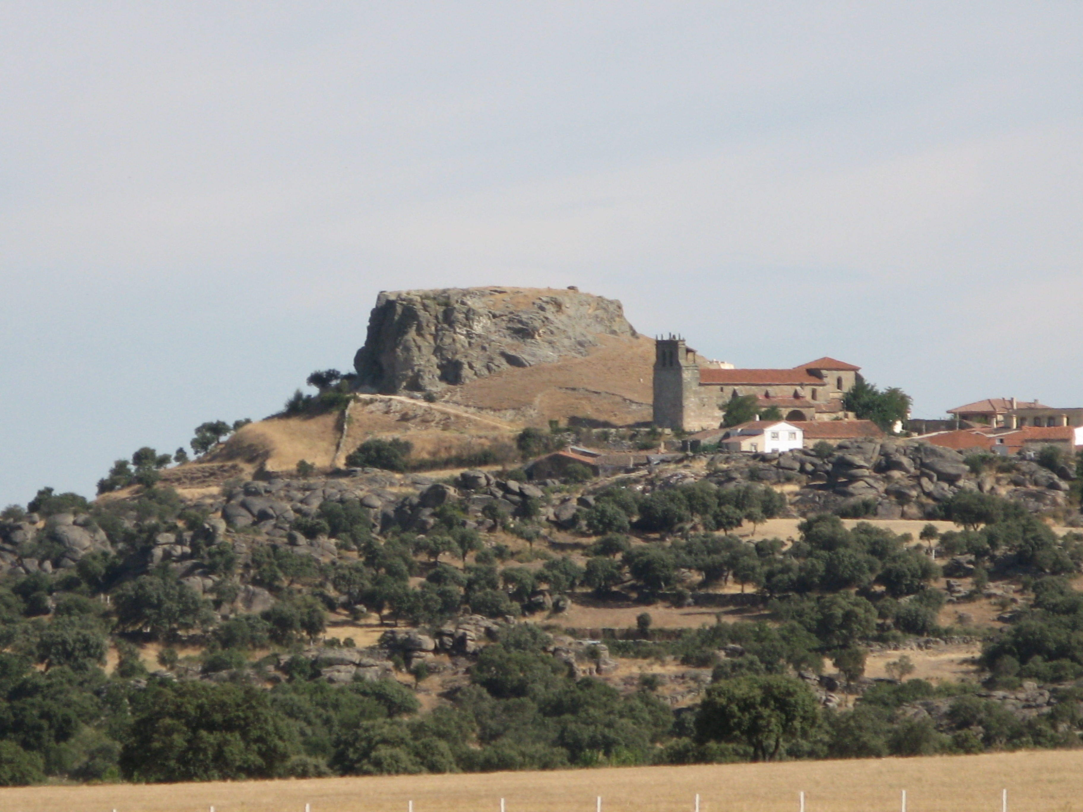 Vista parcial de Peñausende, en la provincia de Zamora, España